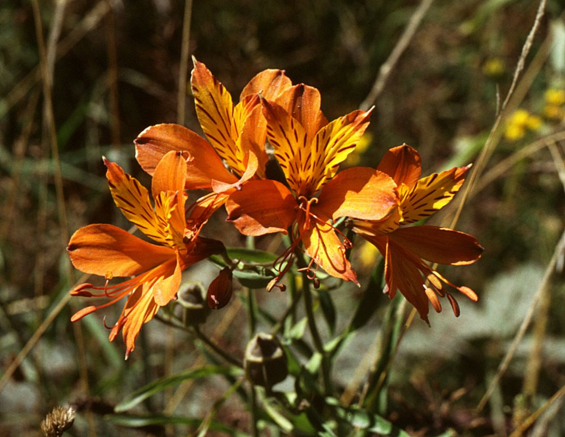 Alstroemeria aurea, Alstroemeriaceae - Chile, Ostufer des Sees Lago Llanquihue bei Puerto Klocker (Prov. de Osorno)